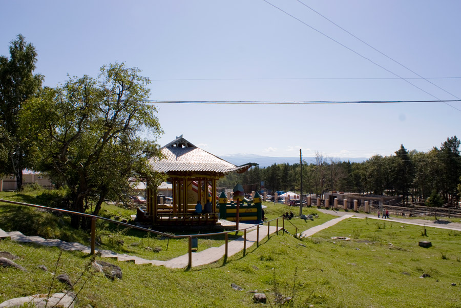 Парковая зона поселка Аршан, Бурятия